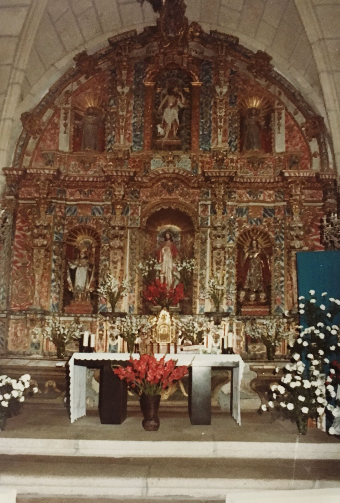 interir igrexa valongo